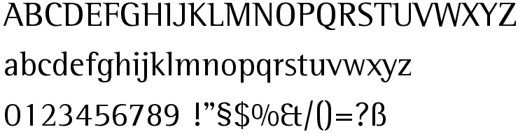 Schriftartenmuster der Rotis semi serif